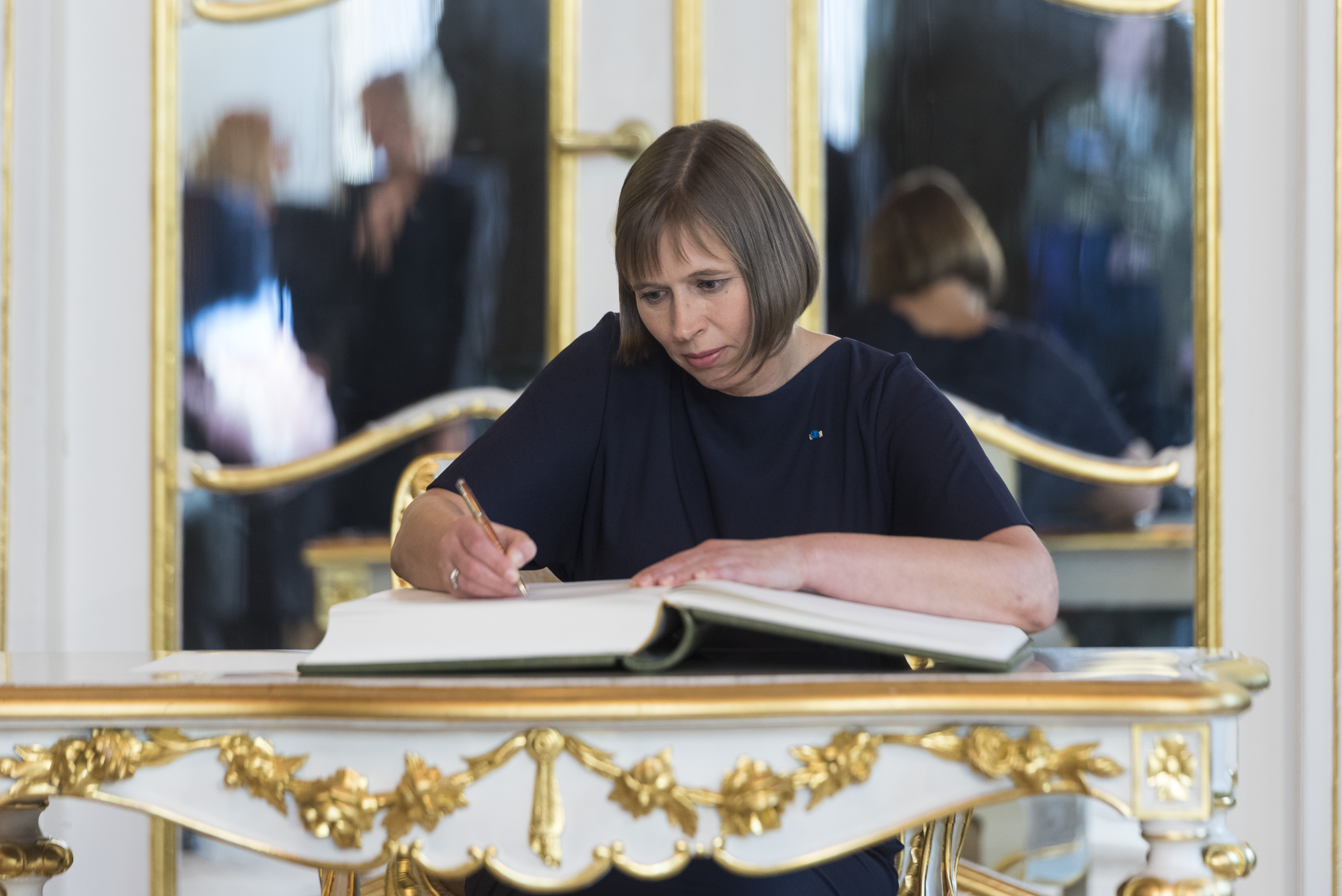 2016.gada 21.oktobris. Saeimas priekšsēdētāja Ināra Mūrniece tiekas ar Igaunijas Republikas prezidenti Kersti Kaljulaidu (Kersti Kaljulaid). Foto: Reinis Inkēns, Saeimas Administrācija Izmantošanas noteikumi: saeima.lv/lv/autortiesibas